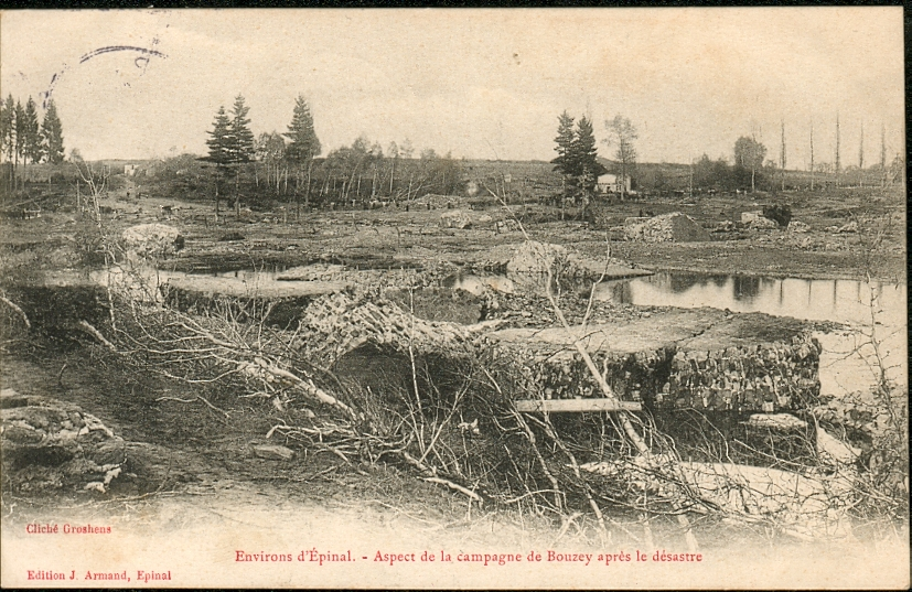 Environs de Bouzey après la castastrophe de 1895